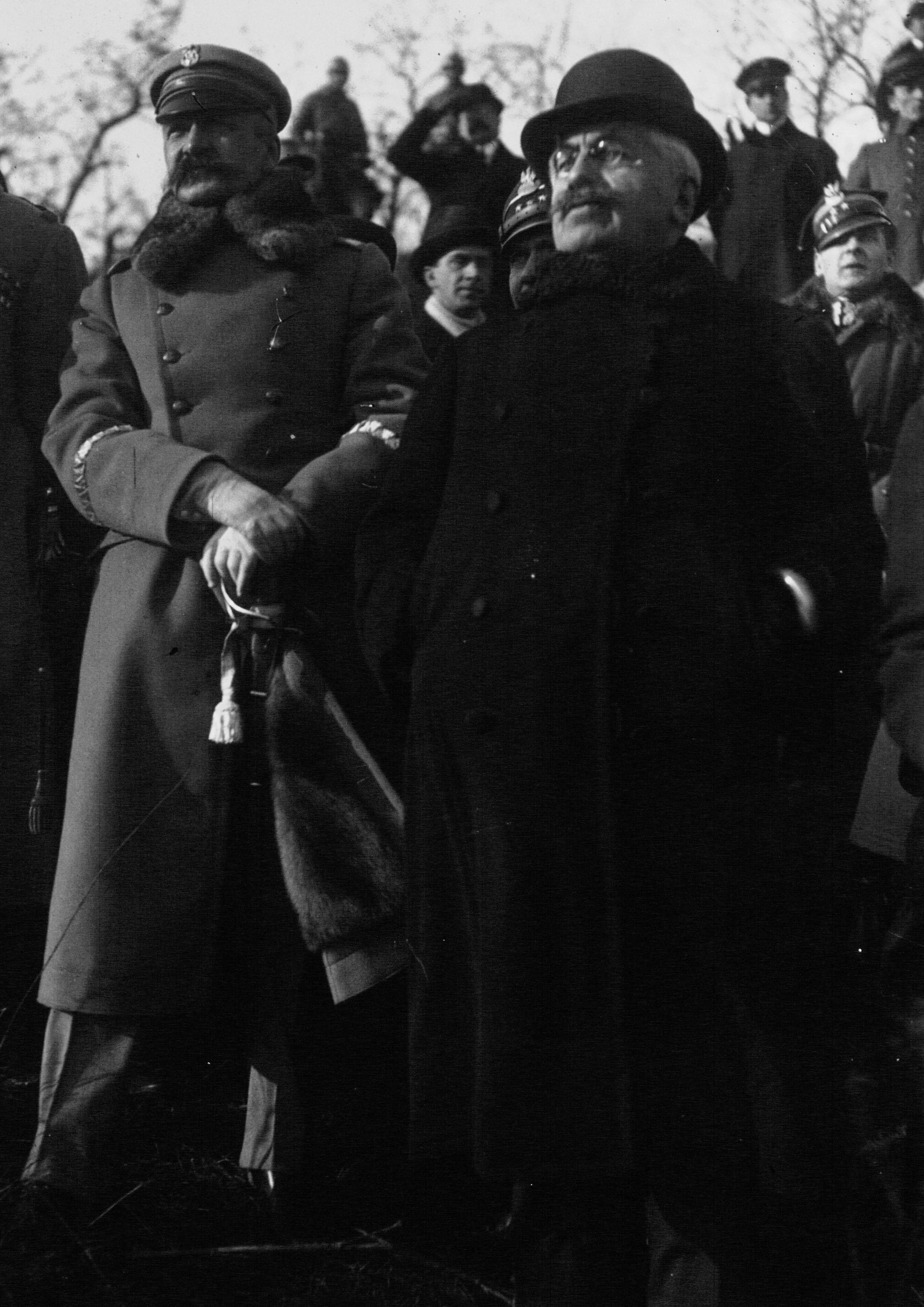 Alexandre Millerand et le maréchal Pilduski